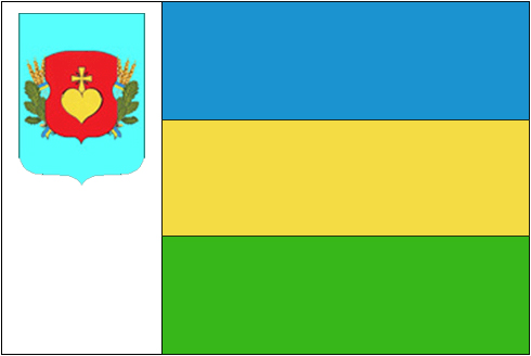 Прапор Срібнянського району Чернігівської області України